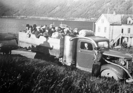 Lastebil med knottgenerator og lasteplanet fult av folk.1940-1945.